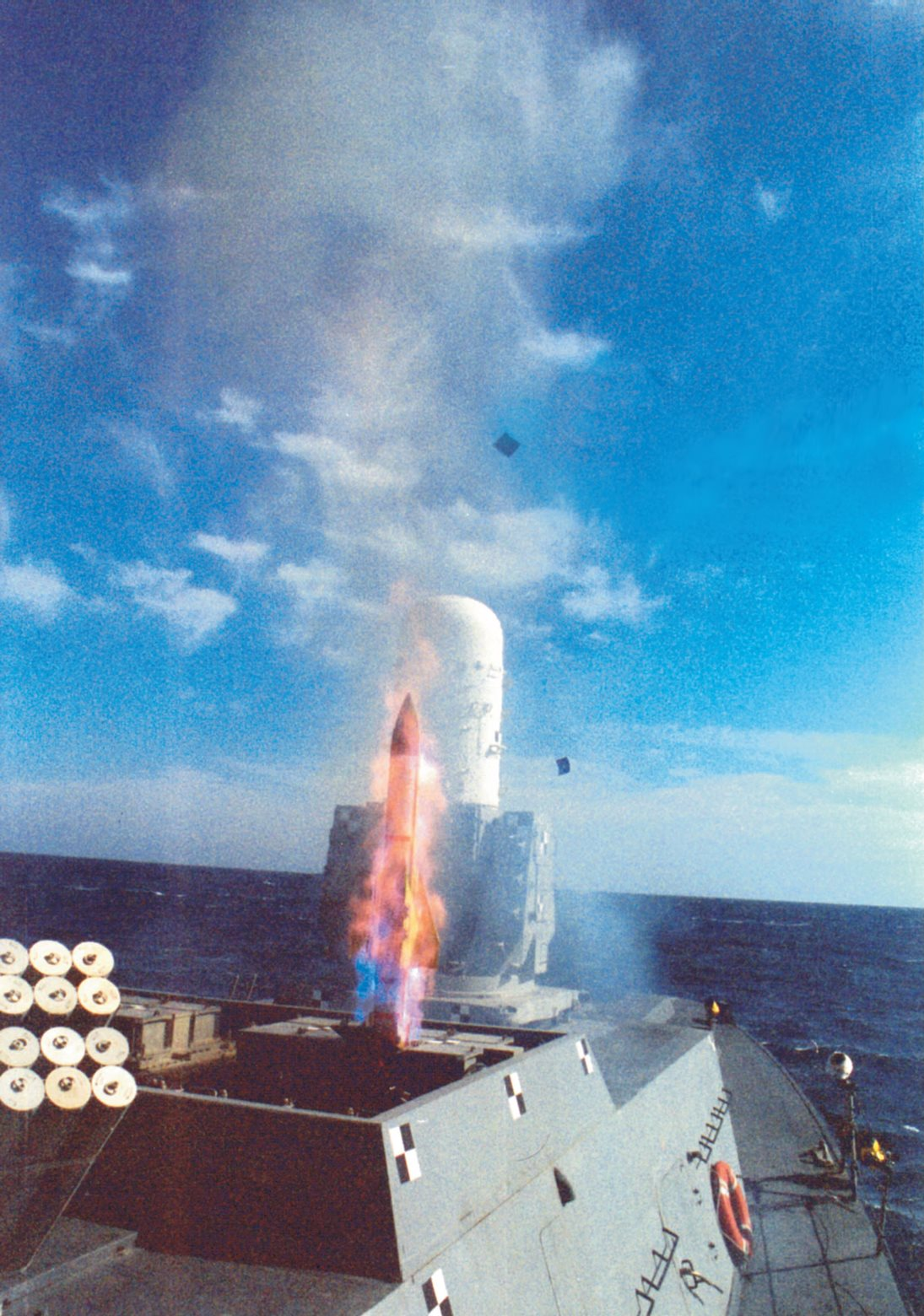 ירי טילים נגד טילים מדגם ברק מספינה דגם סער 4.5